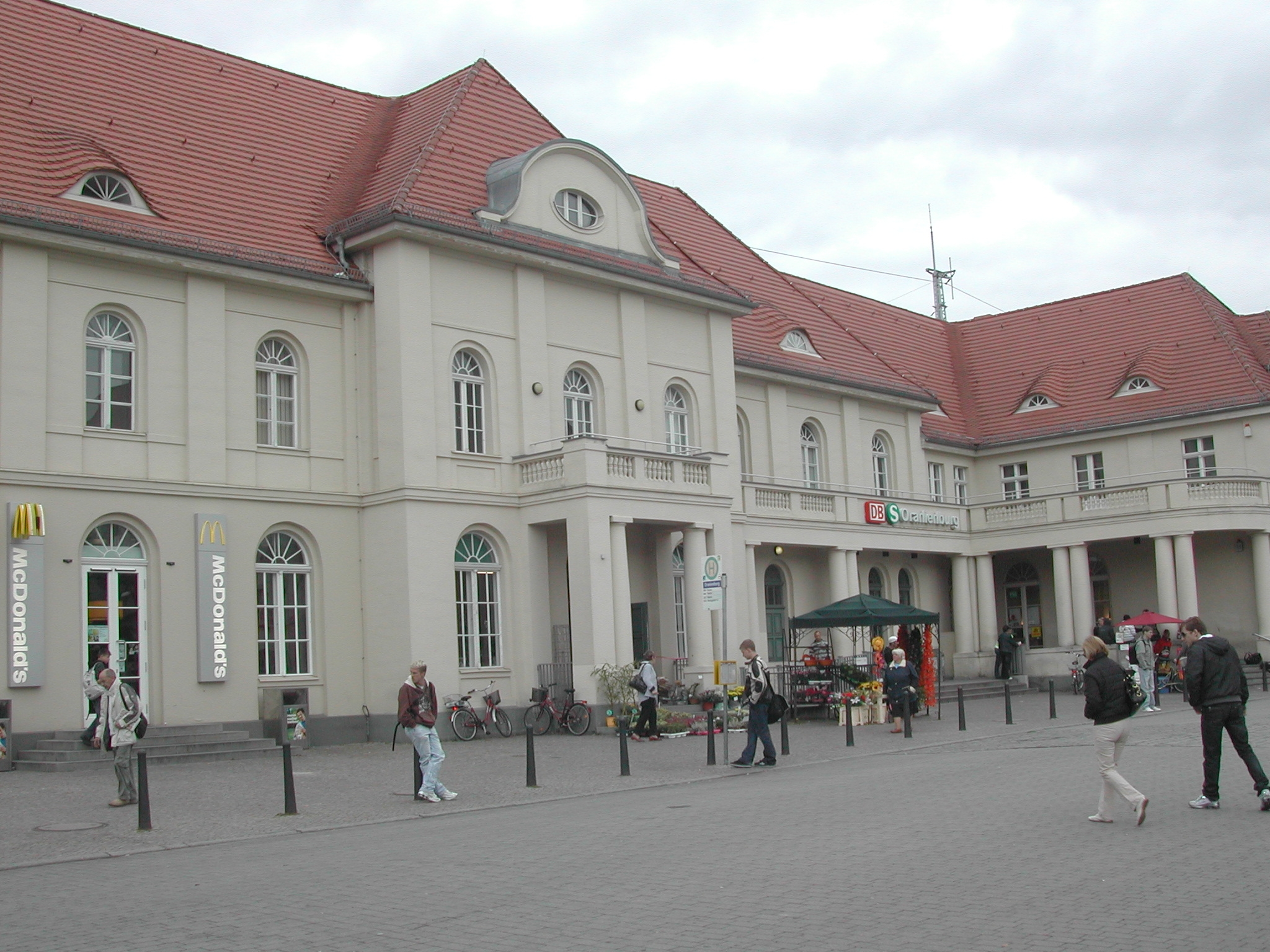 Oranienburg: la stazione ferroviaria